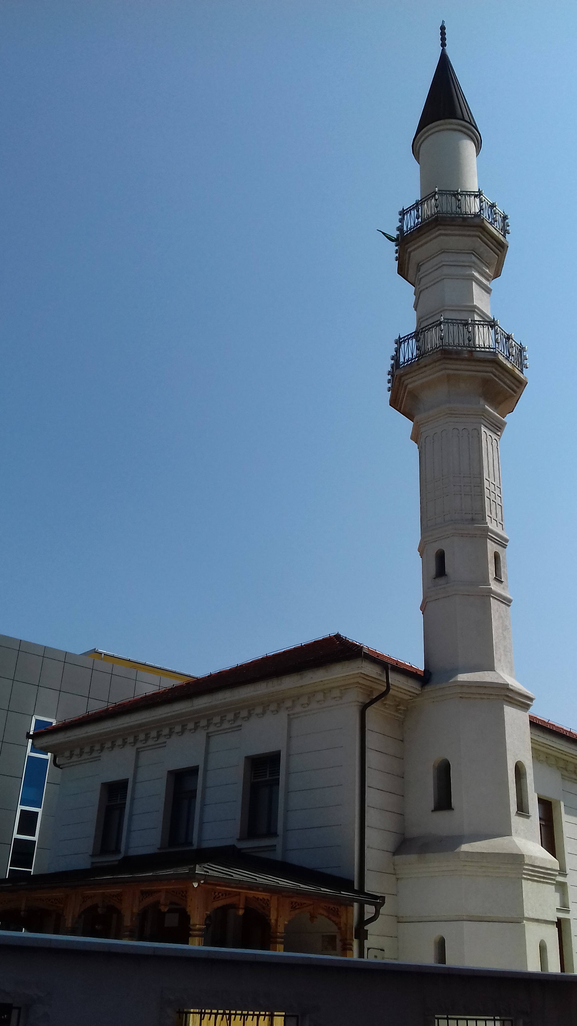 Srpski (latinica): Najveća bijeljinska džamija